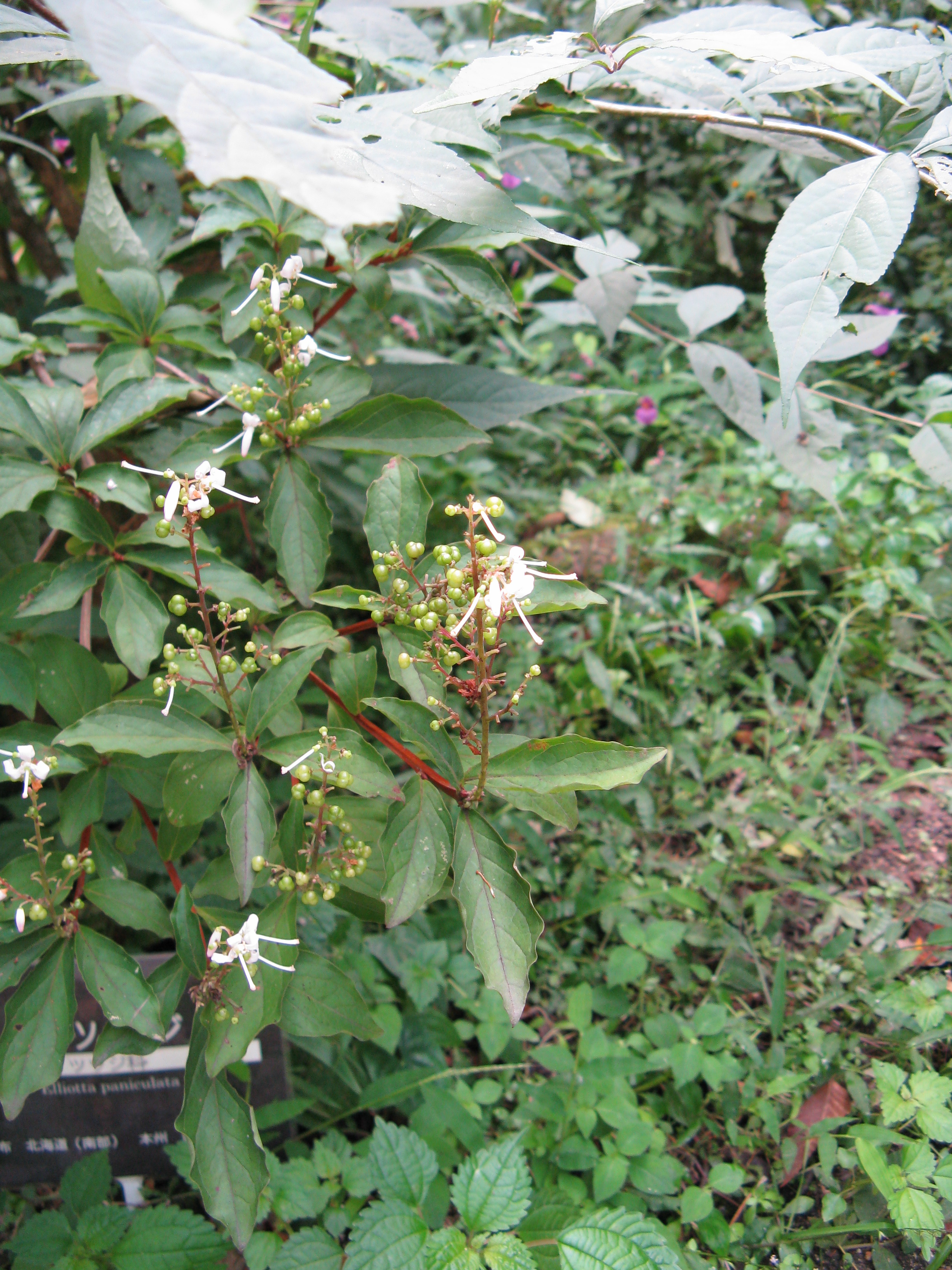 Scientific name Elliottia paniculata